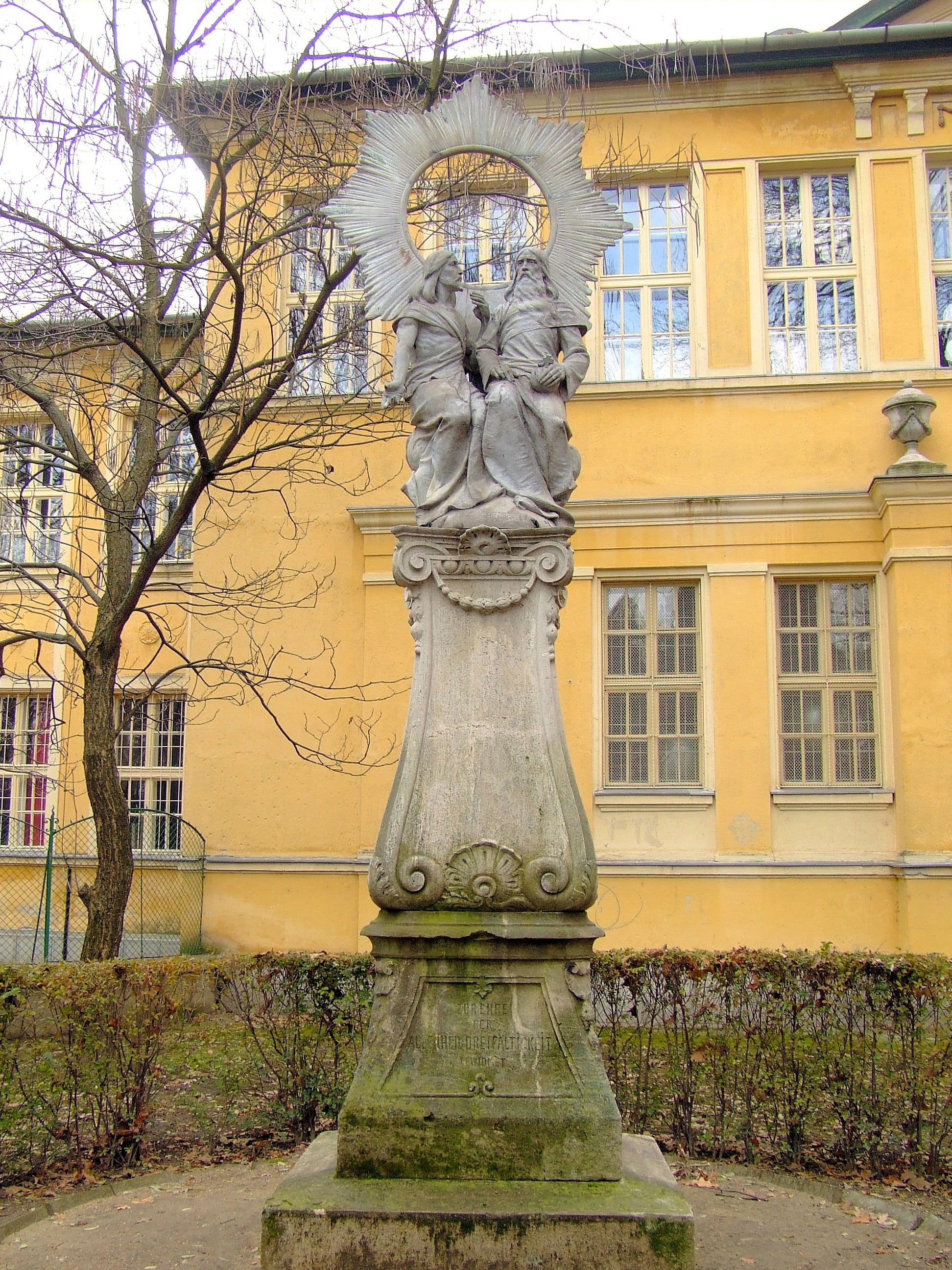 Szentháromság oszlop Bácsalmáson